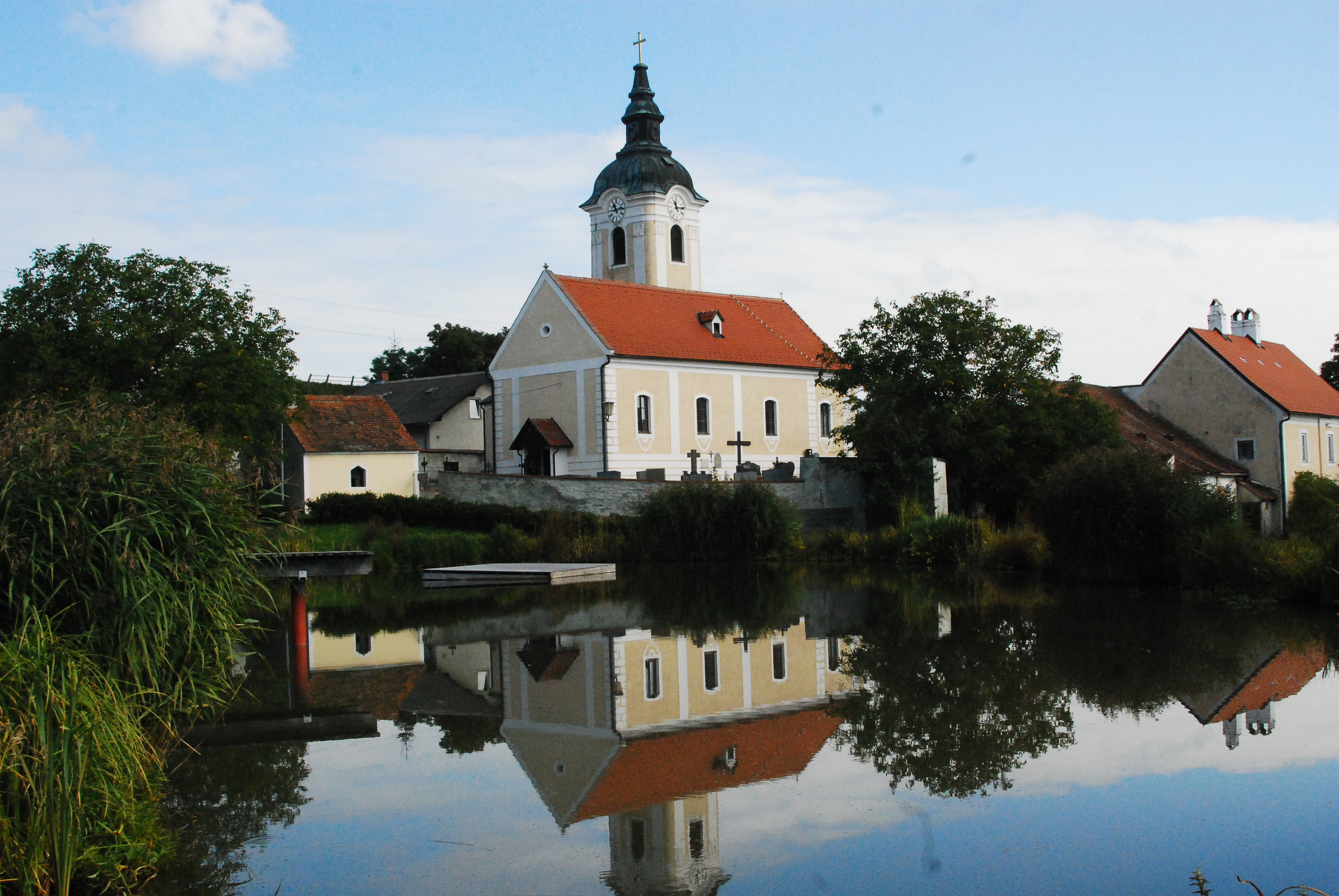 Kath. Pfarrkirche Mariae Geburt und Friedhof